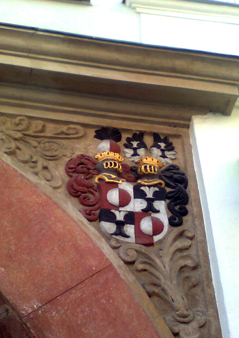 Portaldeteil, Palais Stürgkh, Graz